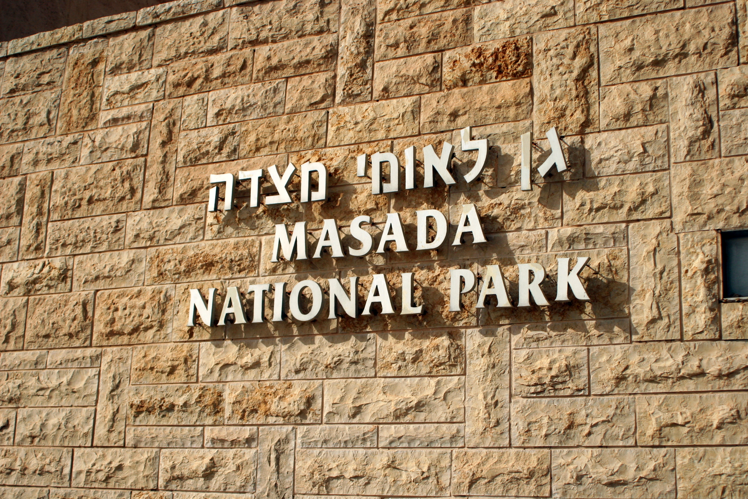 Israel - Masada